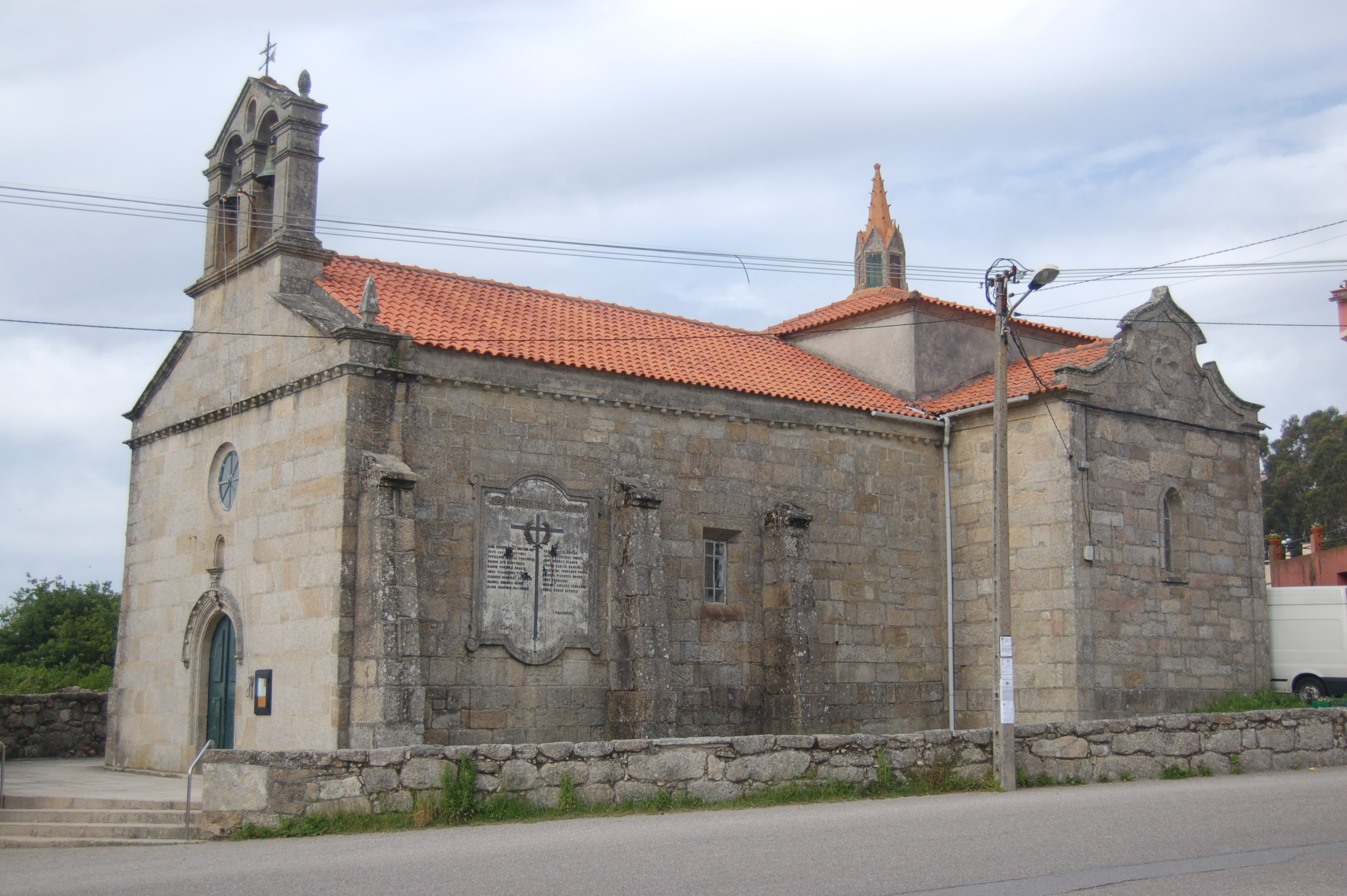 Igrexa parroquial de Santa María de Beluso (Bueu)